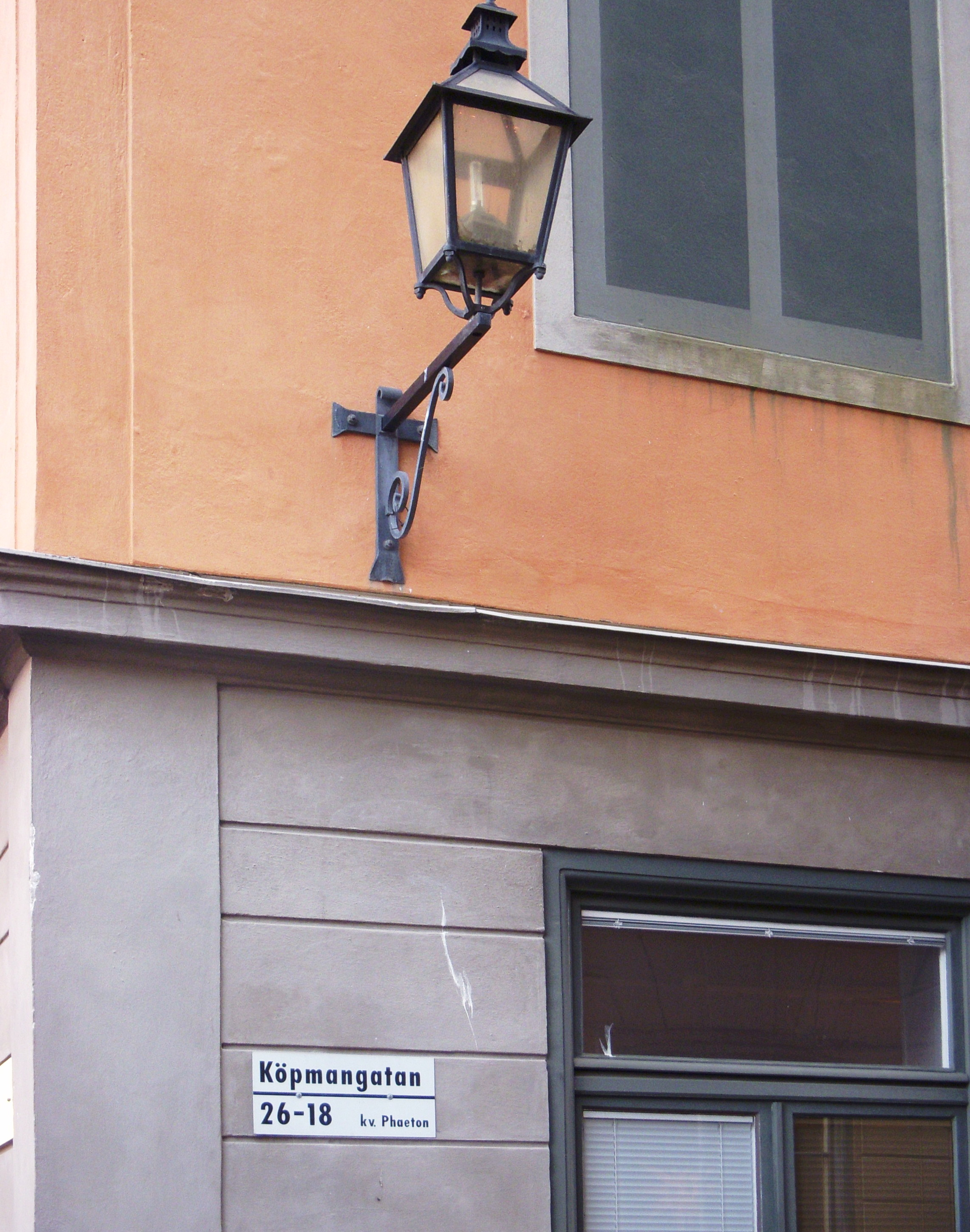 Köpmangatan i Gamla stan i Stockholm